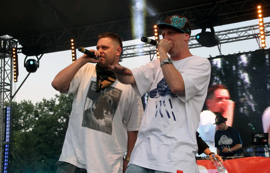 Polish hip-hop group Warszafski Deszcz